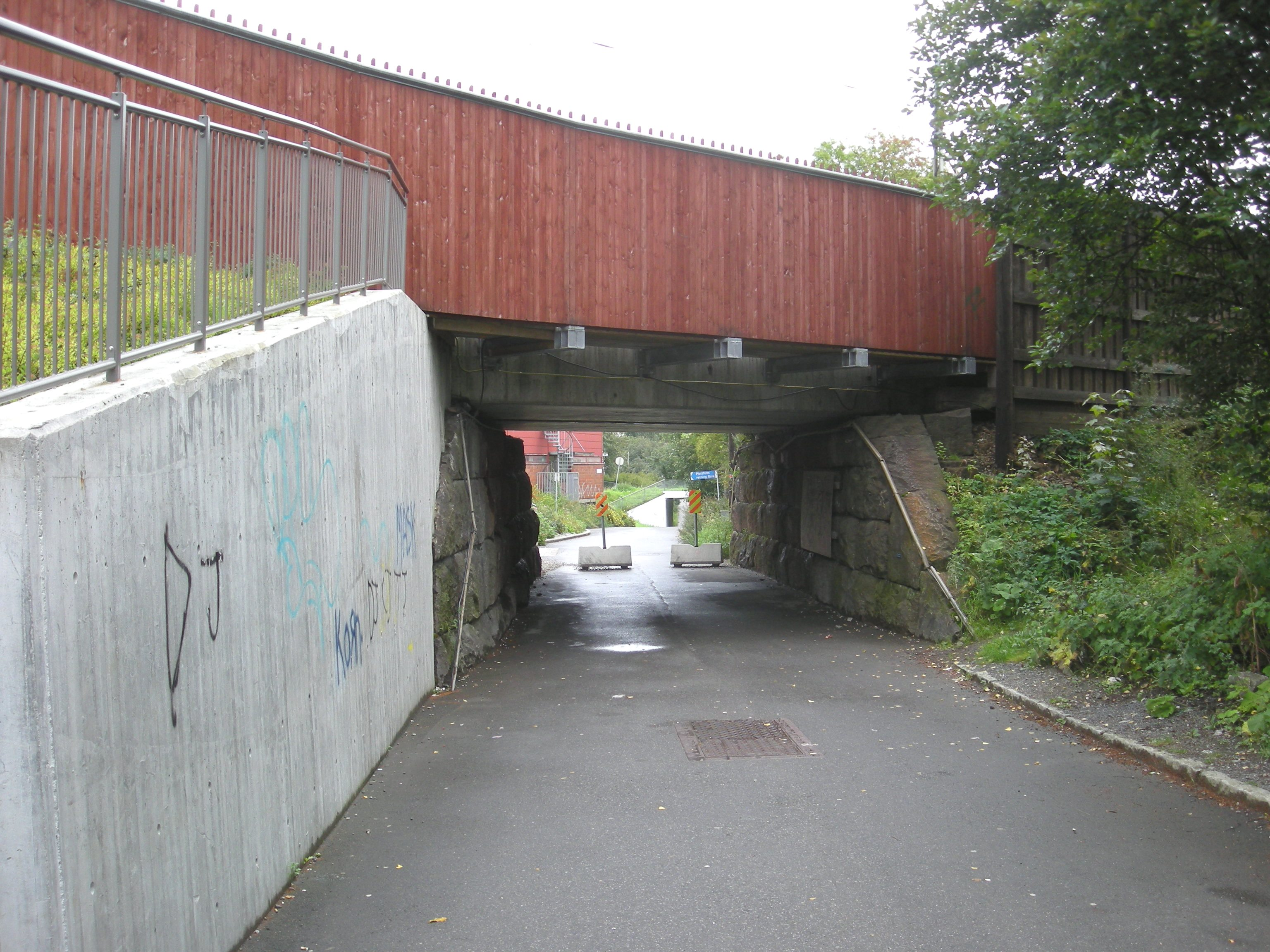 Haugenstuveien ved Haugenstua stasjon er gang- og sykkelvei.